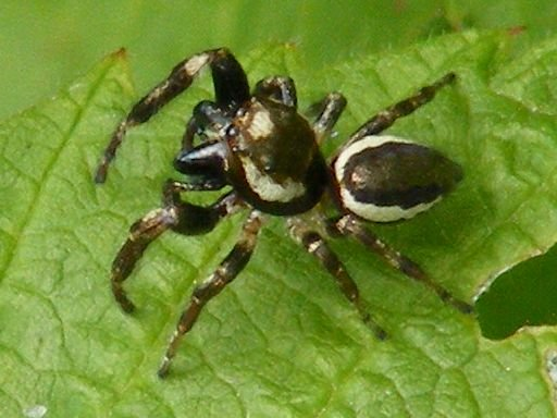 Eris militaris : Photographié dans la région montréalaise le 26 août 2010, sur Fujifilm FinePix S700.